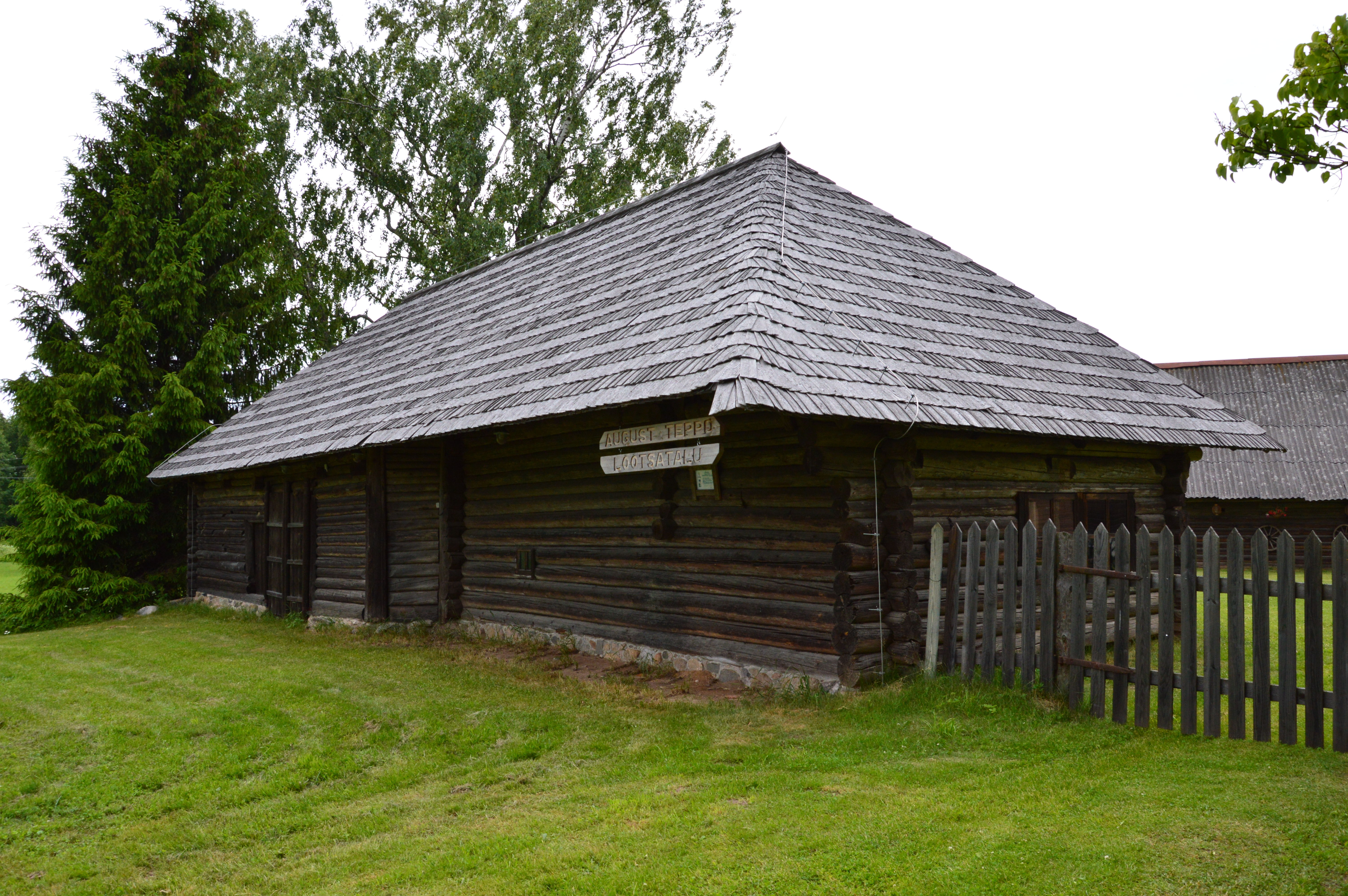 August Teppo lõõtsatalu